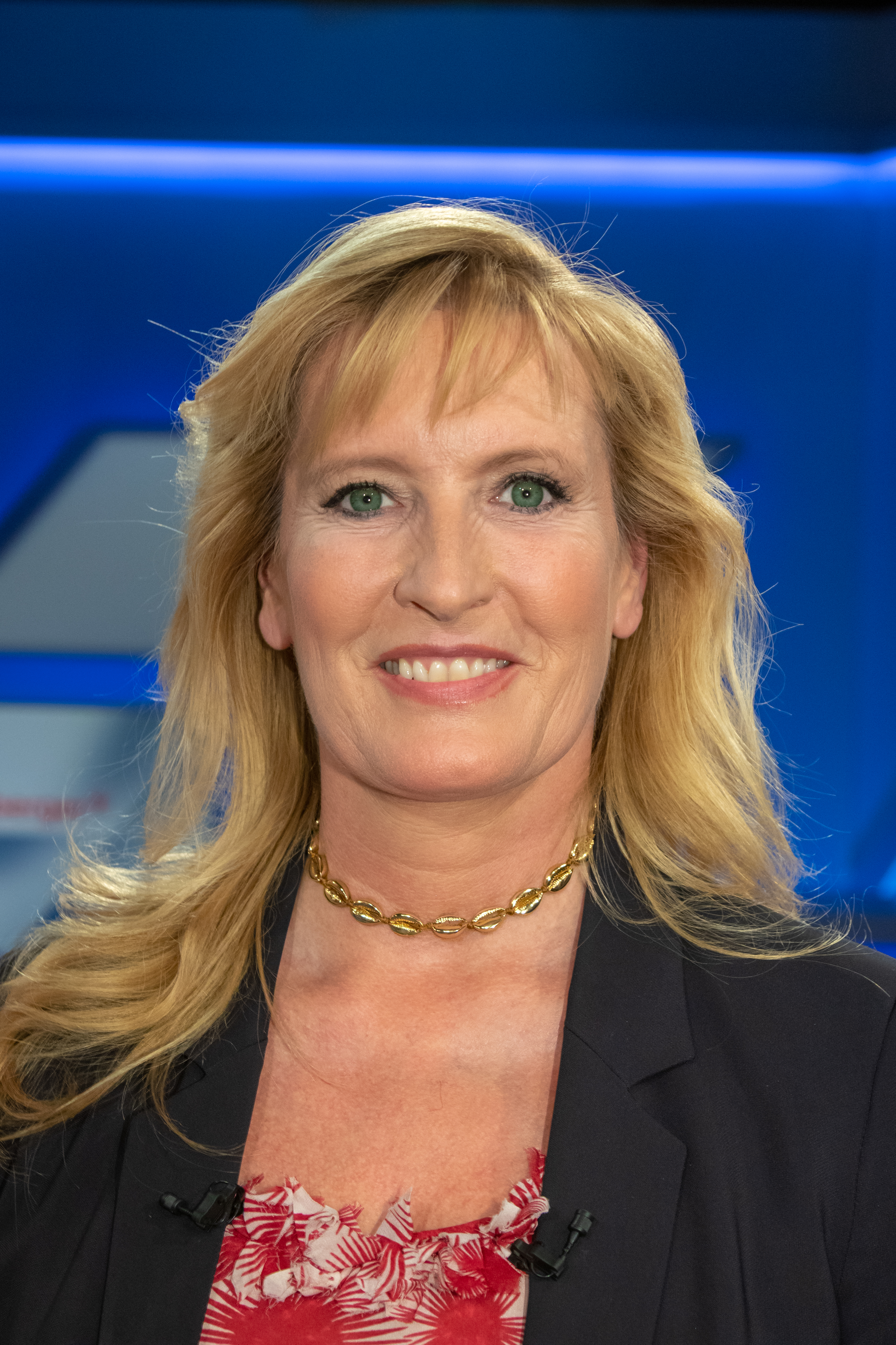 Claudia Kleinert in der WDR-Sendung "Maischberger" am 2019-04-10